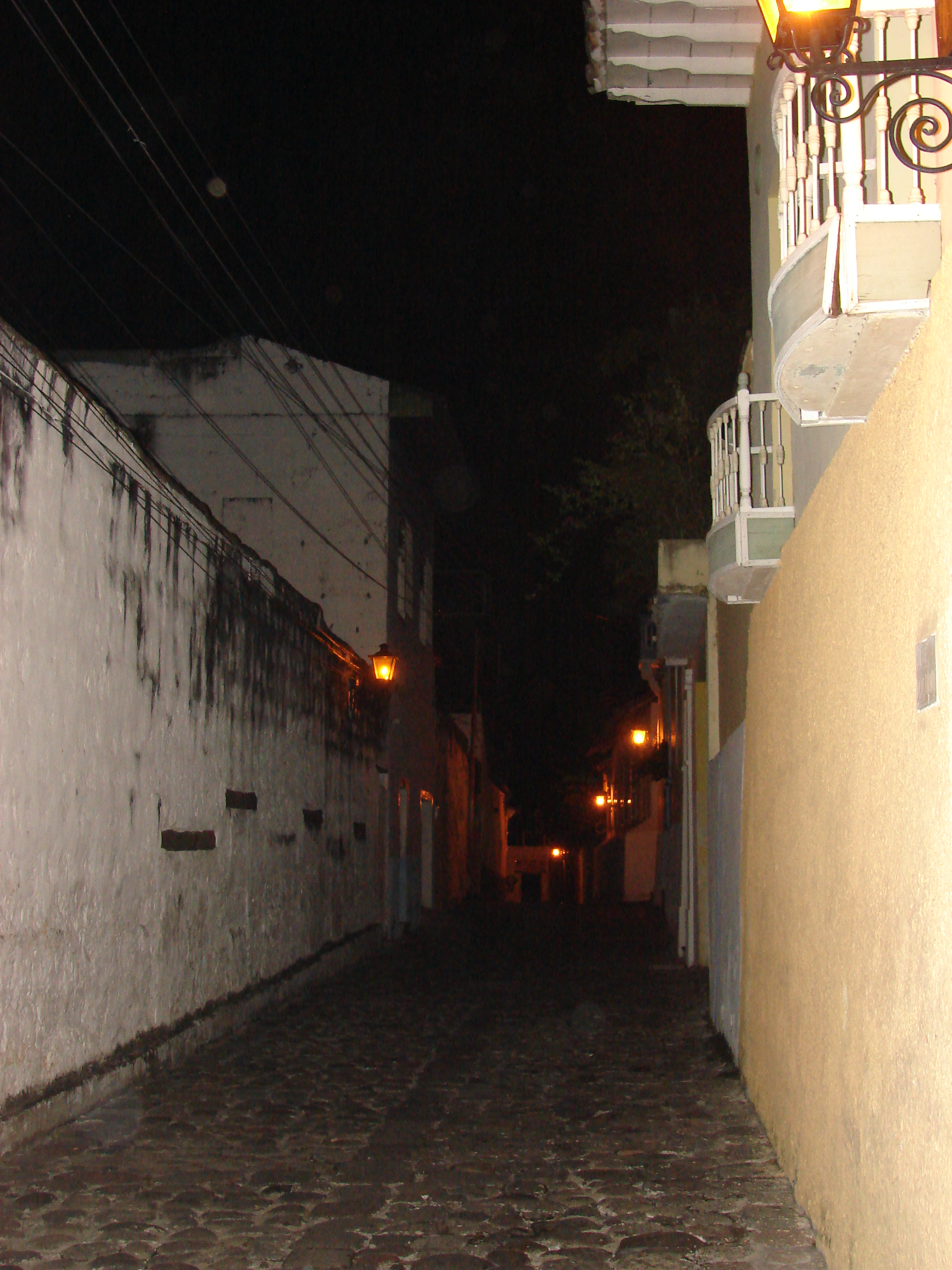 Sector colonial 2 Honda-Tolima. A Pulido-Villamarín.